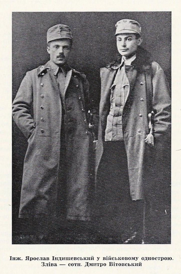 Ярослав Індишевський (справа) у військовому однострої з сотником Дмитром Вітовським.